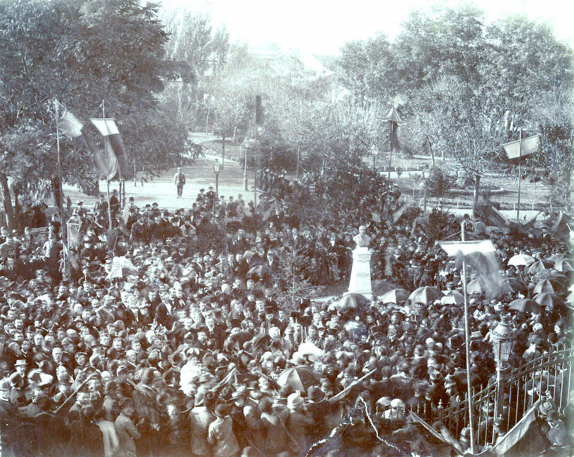 Serbarea inaugurării bustului lui M. Kogălniceanu, în ziua de 26 octombrie 1893 în Parcul Municipal din Galaţi: [Fotografie]. - Galaţi: Foto E. Carrez, 1893 Bust de bronz, ridicat pe un soclu de granit, în mijlocul parcului municipal, în 1893 de un comitet de gălăţeni, în frunte cu V. A. Urechia, drept recunoştinţă marelui om de stat şi orator, pentru că a apărat cu toată puterea talentului său la 1881, interesele comerciale ale ţării la Dunăre, în parlament şi presă, după desfiinţarea porto-francului. În mijlocul mulţimii este prezent şi V. A. Urechia